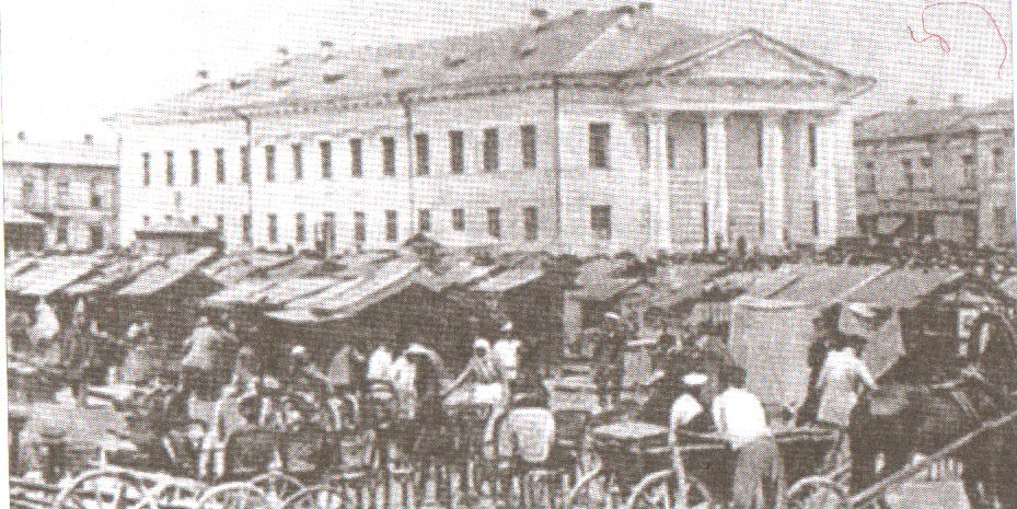 Київський_контрактовий_ярмарок_кін_19_ст.jpg: Київський контрактовий ярмарок, фото кінця 19 століття